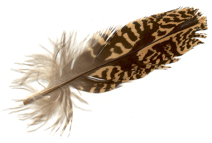 self made.